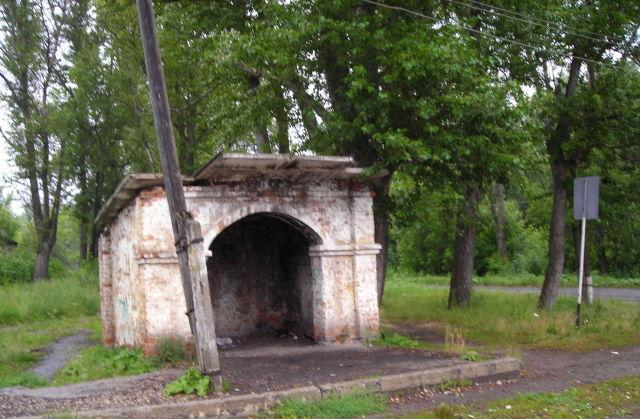 Красницкий вокзал